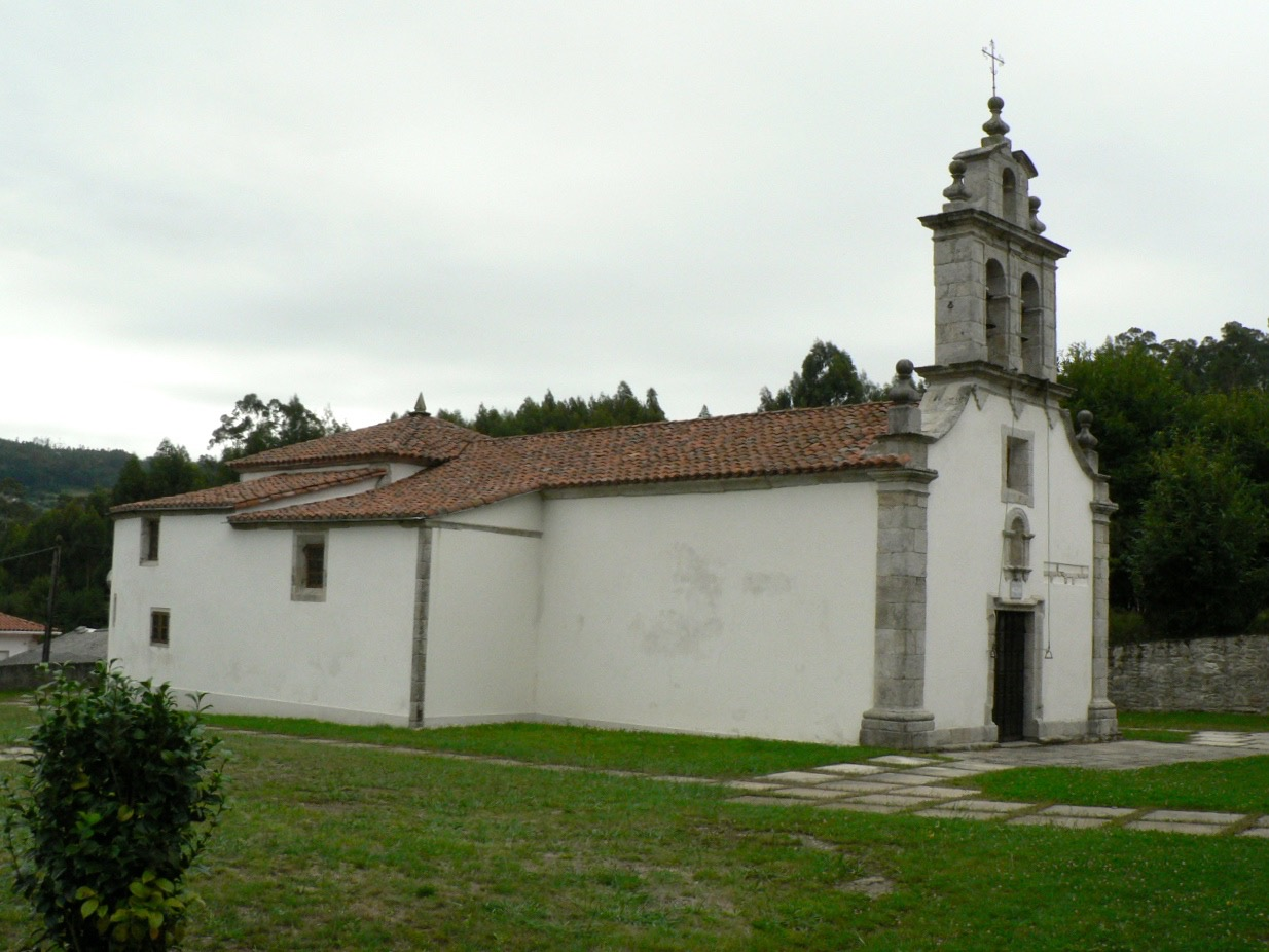 Iglesia parroquial de San Pedro de Vilar, en Pontedeume, provincia de A Coruña, Galicia, España.